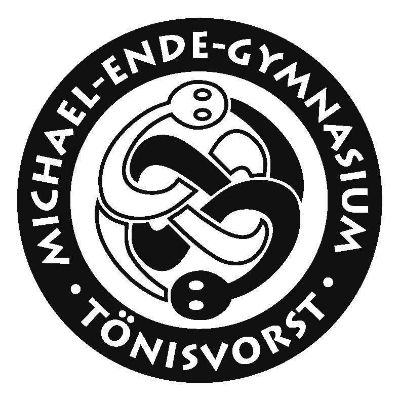 Dieses Bild stellt das Logo des Michael-Ende-Gymnasiums zu Tönisvorst dar. Es wurde im Jahre 2014 überarbeitet. Vorliegend ist die moderne Version.